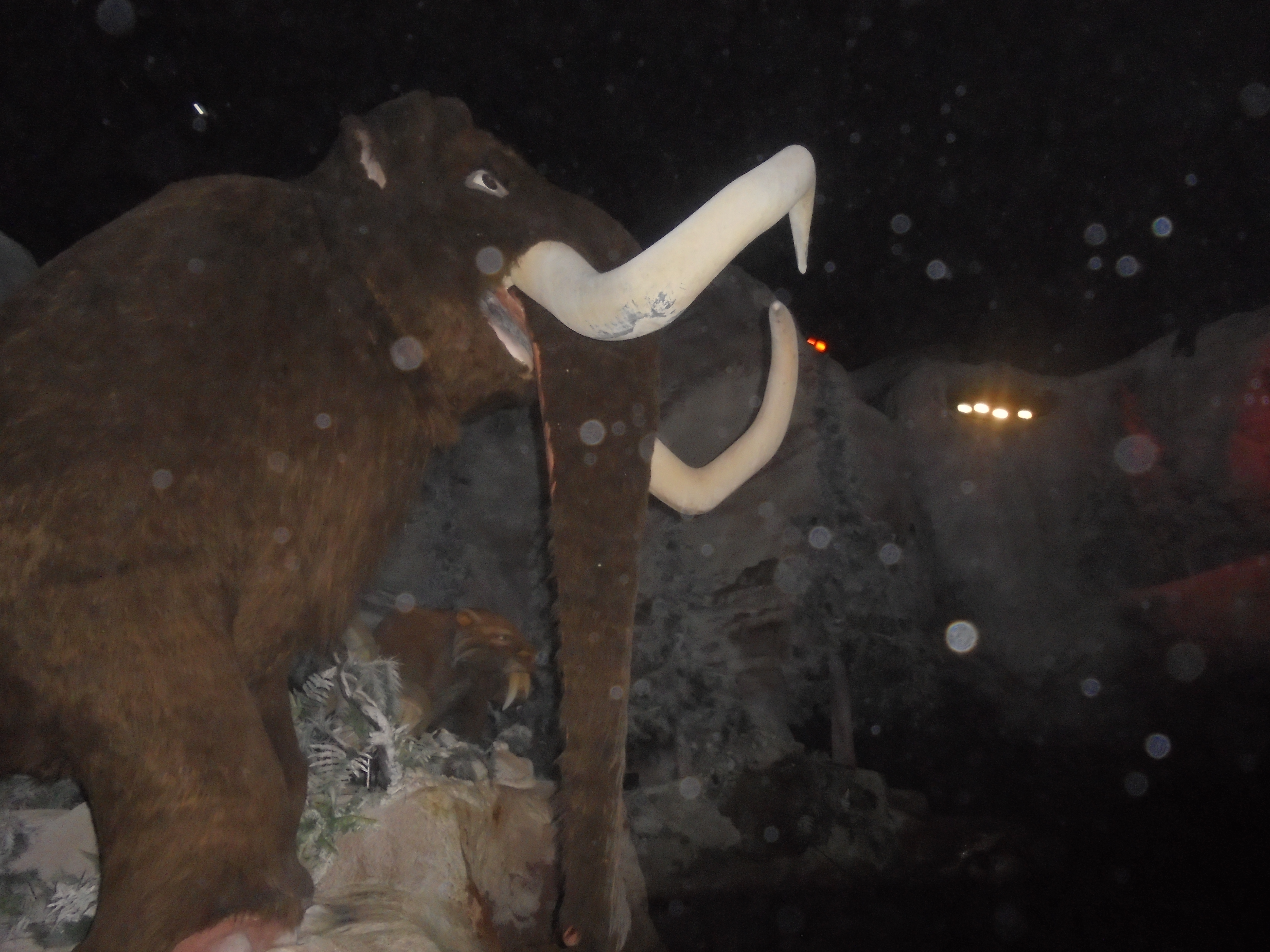 Ice Age Adventure